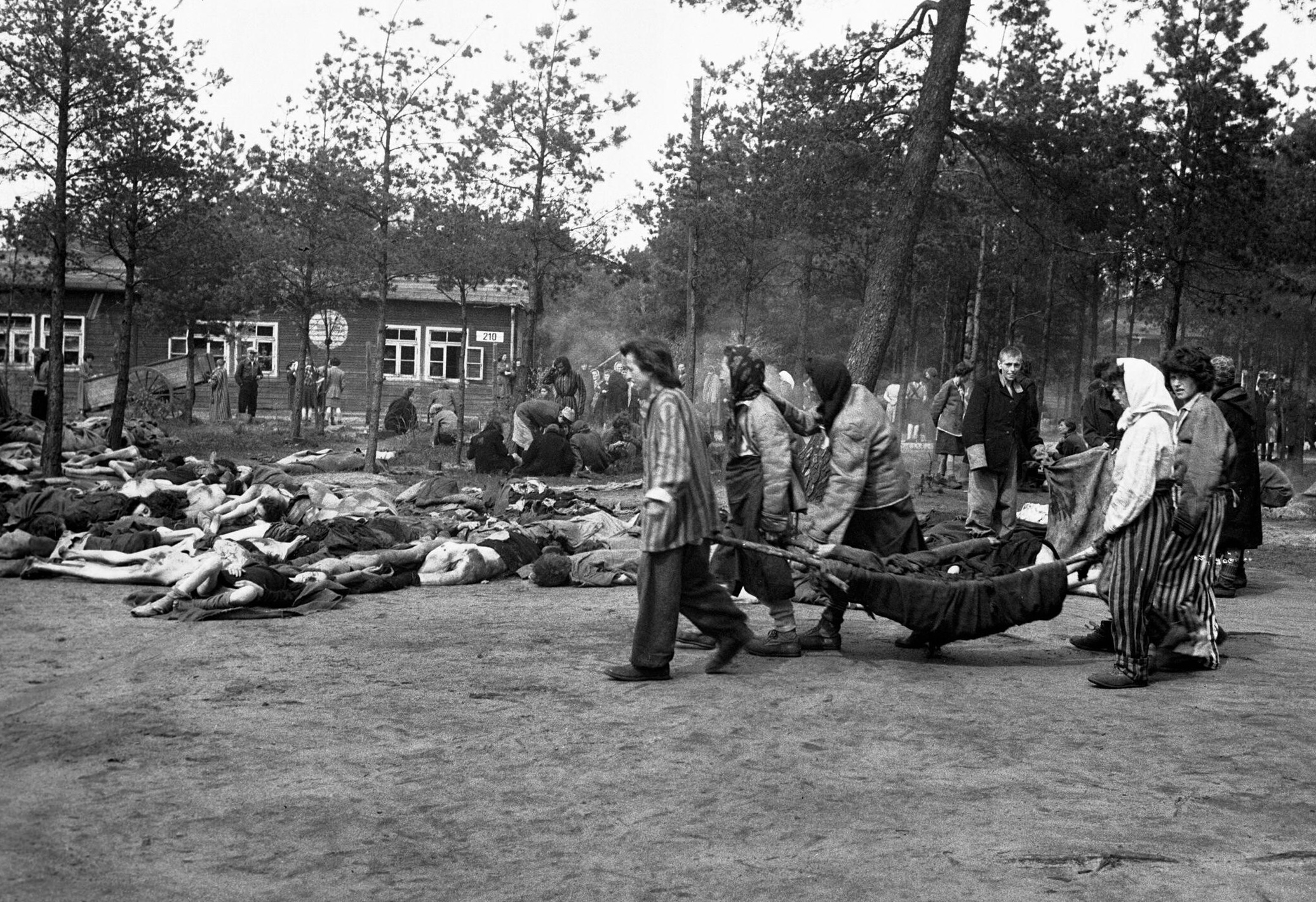 Bergen-Belsen Häftlinge, die selbst völlig erschöpft waren, trugen die Toten in Decken aus den Baracken, um sie im Freien für die Bestattung abzulegen